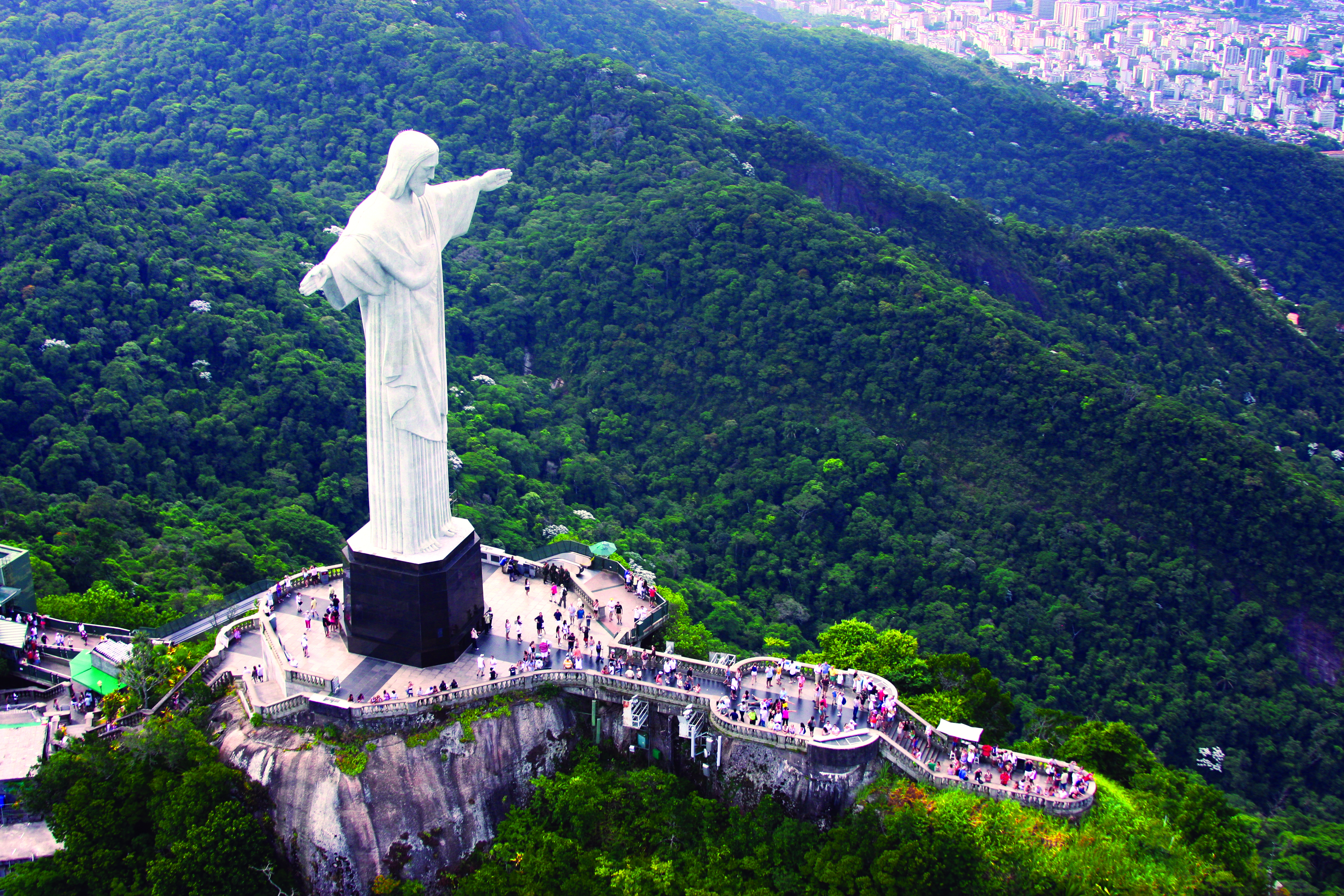 Estátua do Cristo Redentor em meio ao Parque Nacional da Tijuca, no Rio de Janeiro